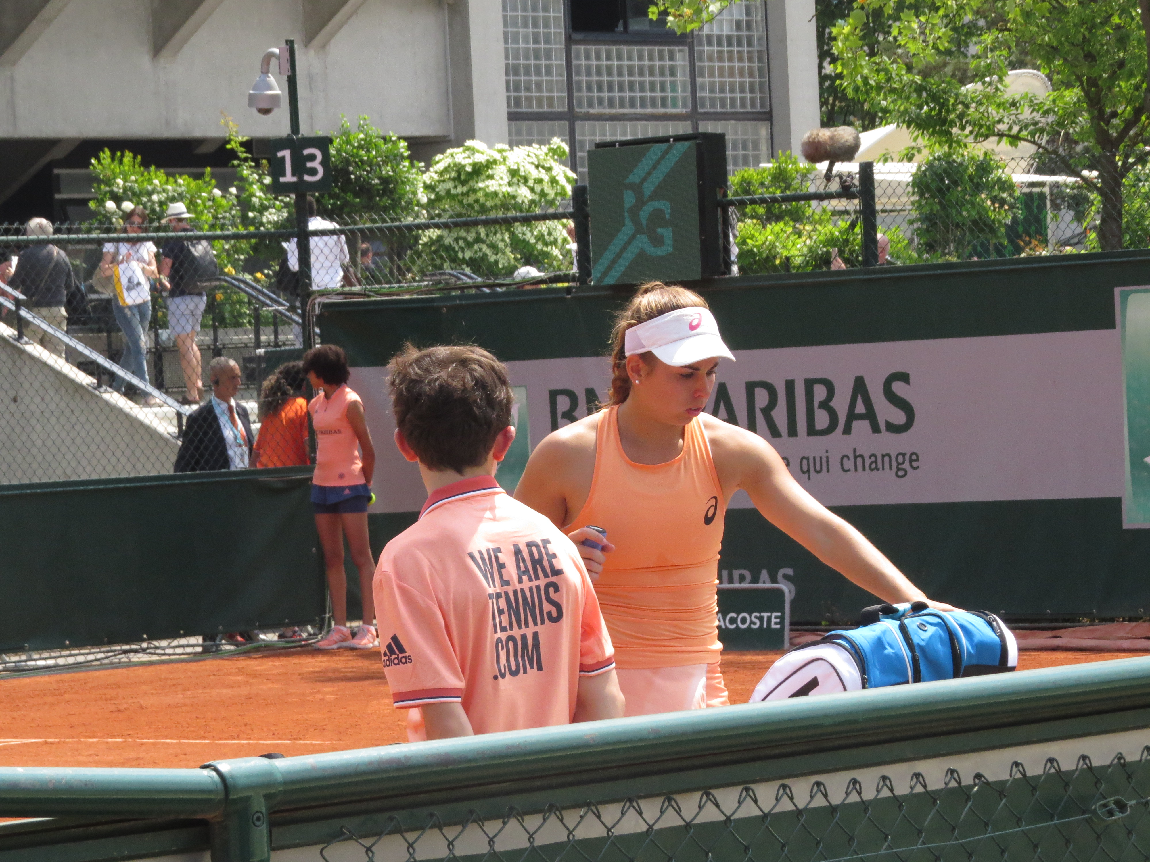 Julia Grabher lors de son premier tour des qualifications face à Polina Monova (court n°13).